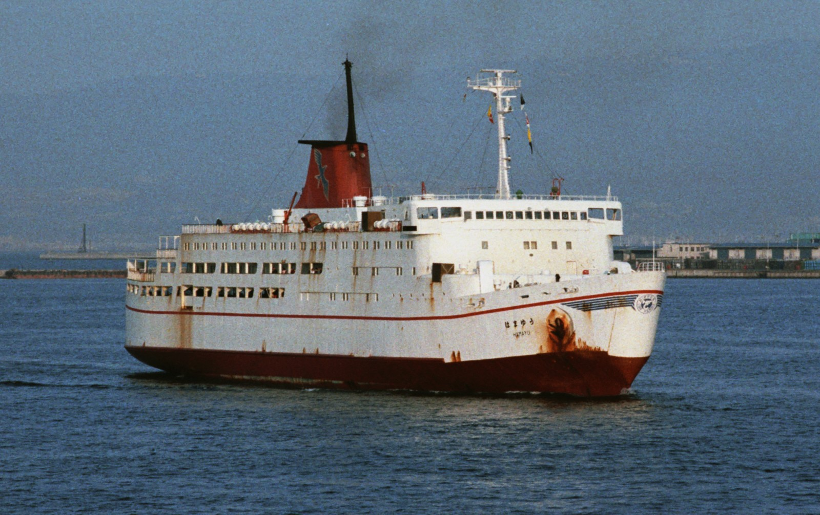 大阪南港に入港する日本カーフェリー・はまゆう